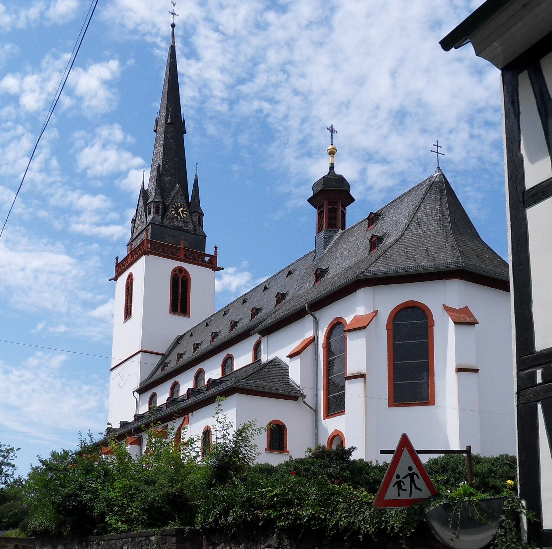 Katholische Pfarrkirche Sankt Markus in Erbach im Rheingau